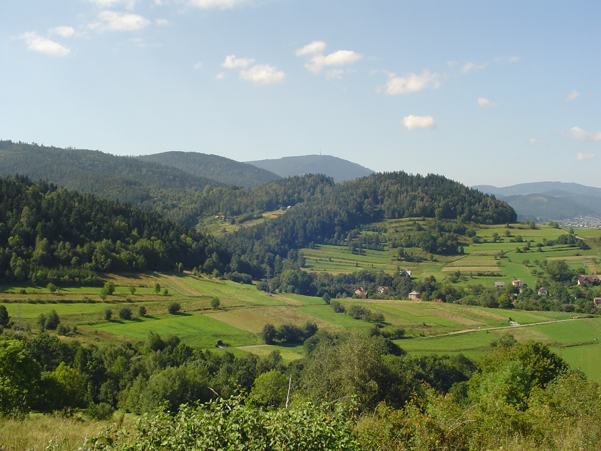 Widok na przysiółek Kopiec (Radziechowy) i dalej na Skrzyczne z Matyski.